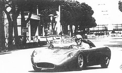 Bandini motore posteriore, Teodoro Zeccoli a Cesenatico. Foto tratta dal libro Bandini (storia e automobili di Ilario Bandini)